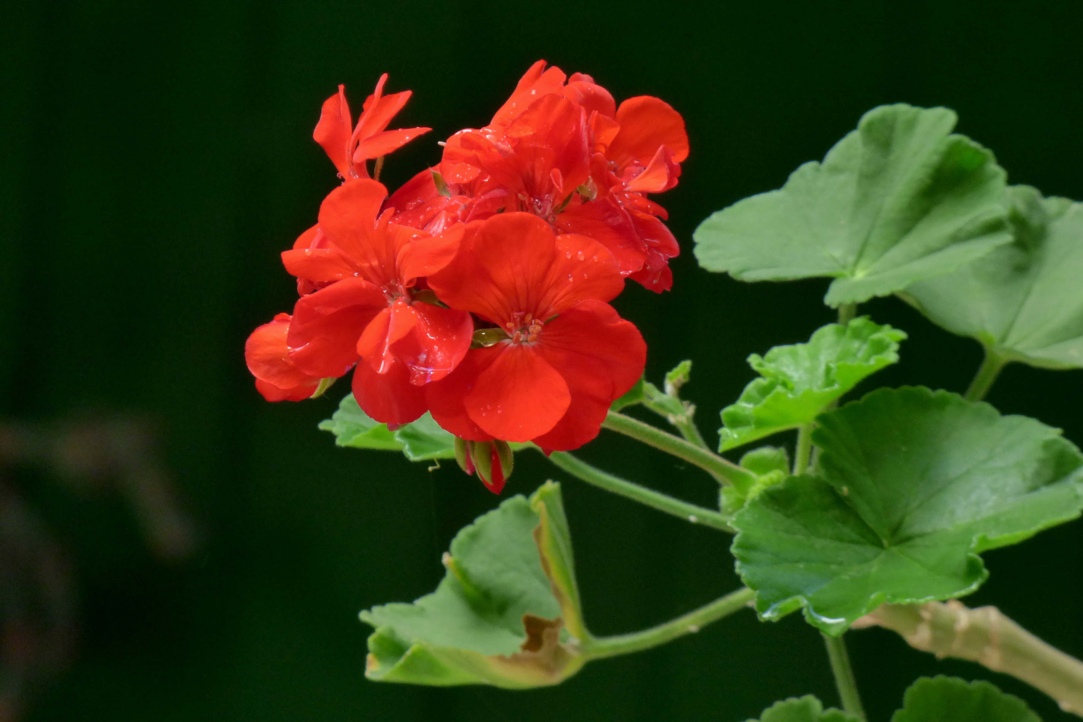 Geranio (Pelargonium hortorum)